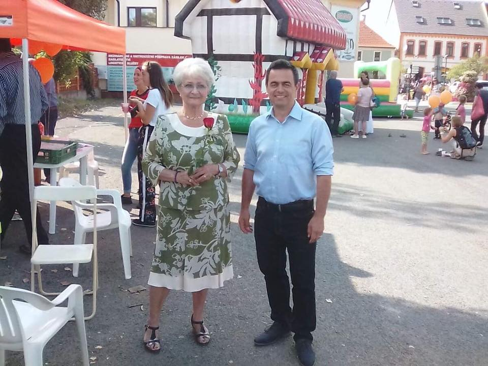 Milada Emmerová a Martin Uhlíř - kandidáti do Senátu v obvodu č. 8 při setkání během volební kampaně v září 2018